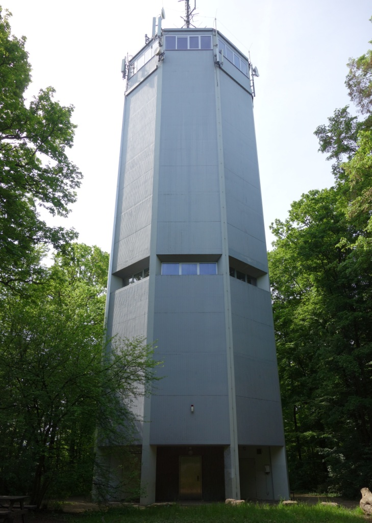 Das Foto wurde von der Nordseite in Richtung Süd geschossen.